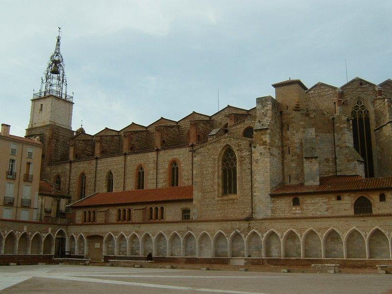 Cathédrale de Perpignan : Vue d'ensemble de l'édifice depuis le Campo Santo